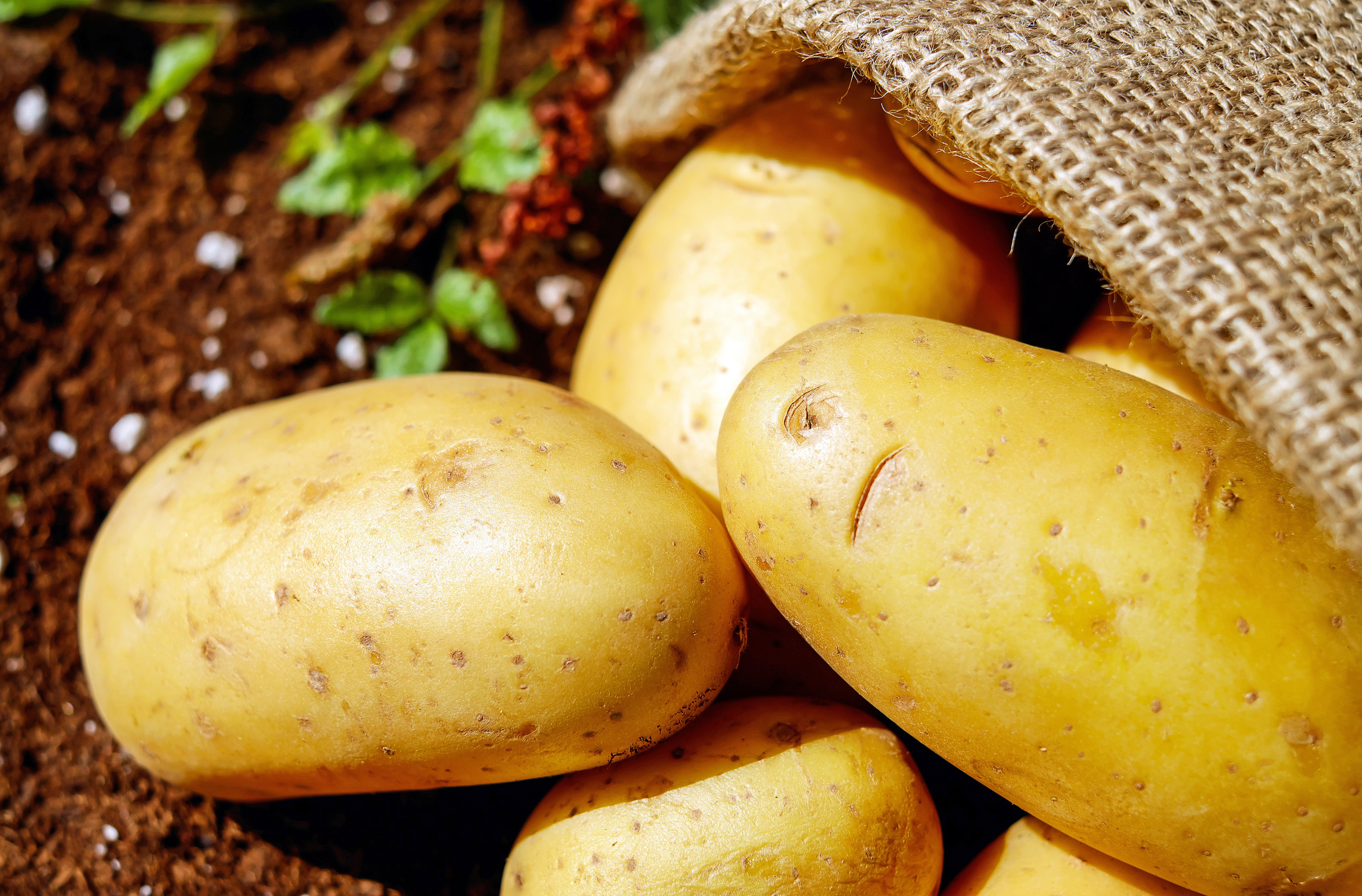 Patate sul terreno in un sacco di juta